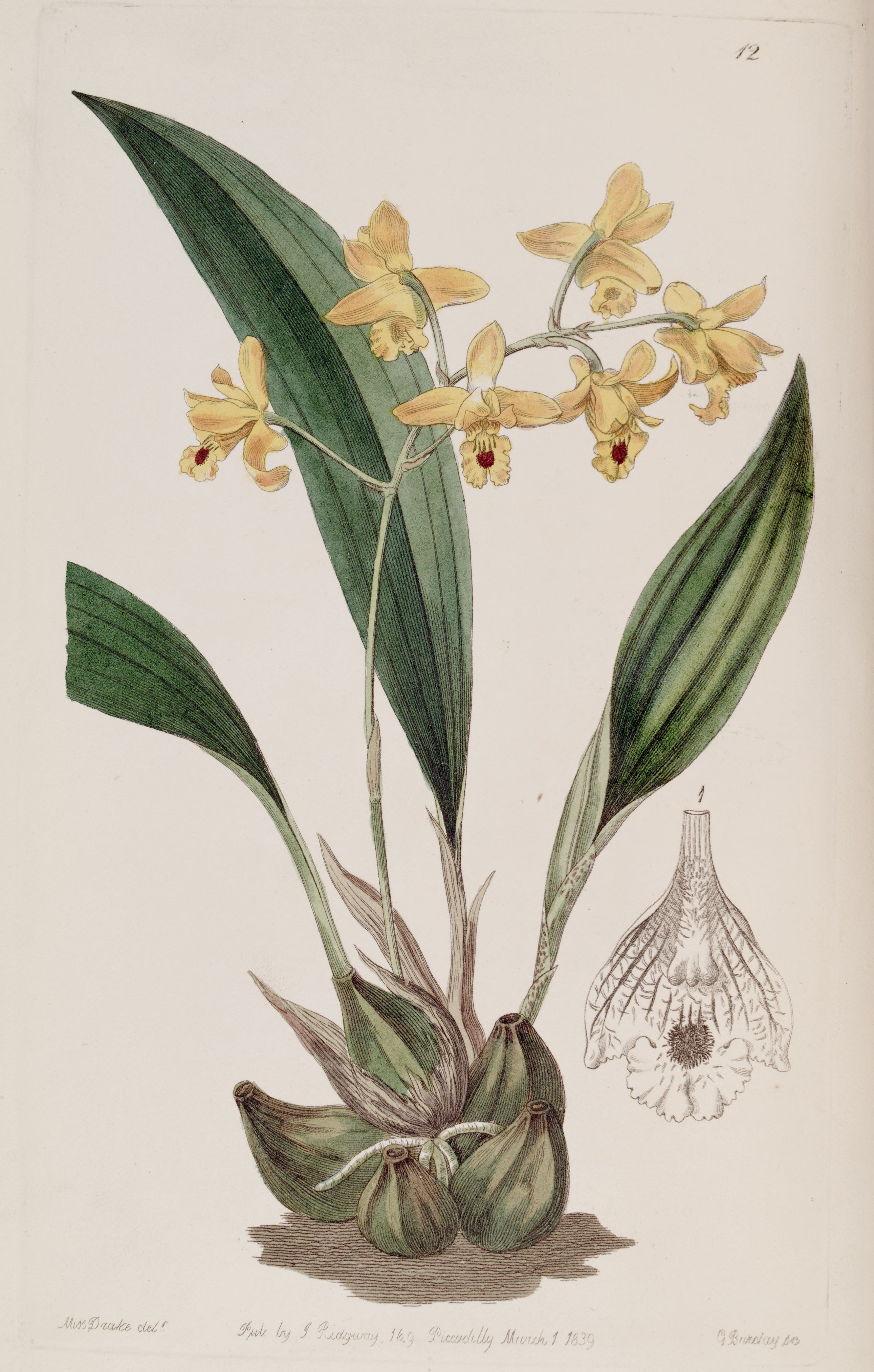 Bifrenaria vitellina (as syn. Maxillaria vitellina)